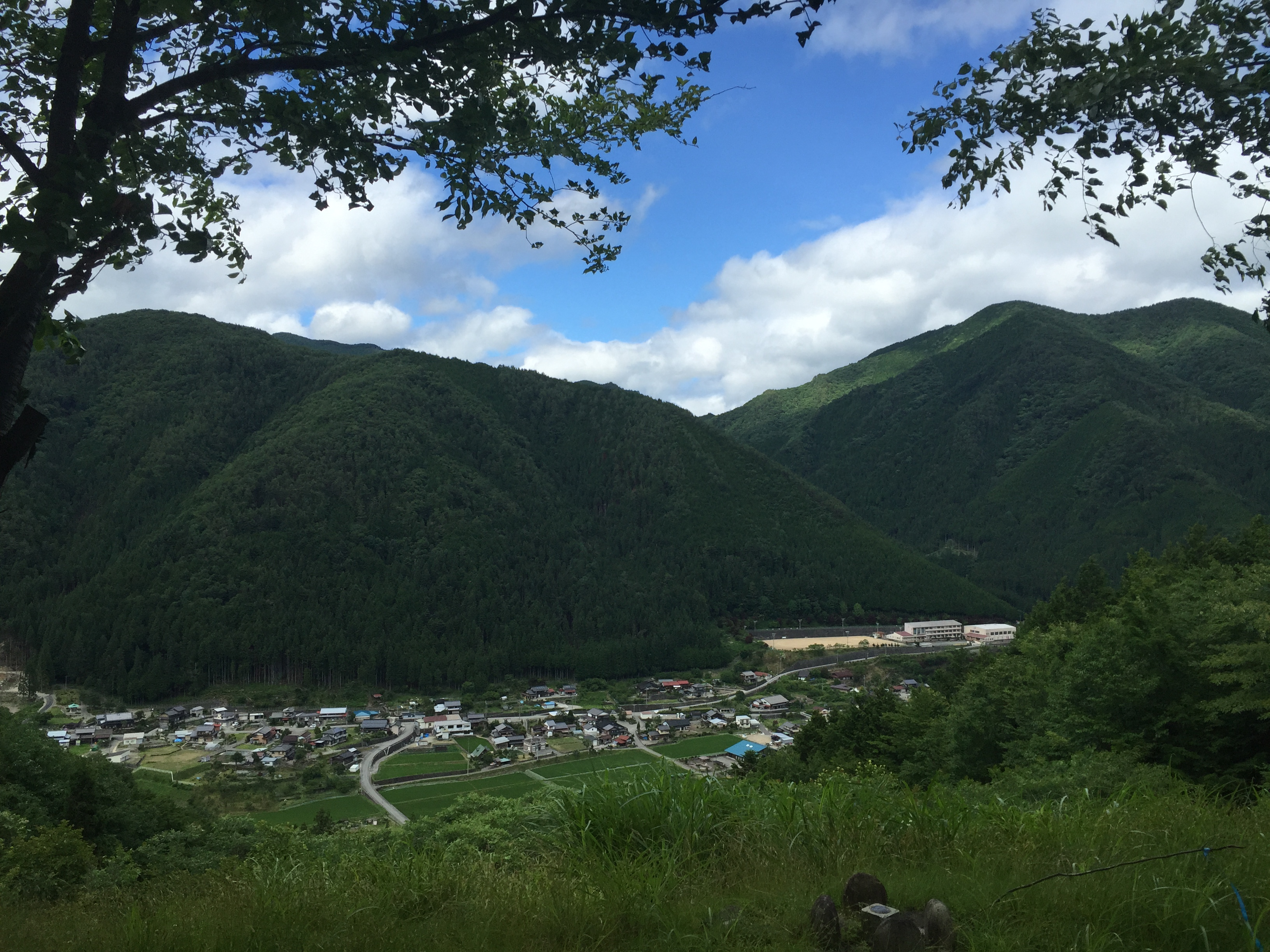 下呂市馬瀬地域の遠景